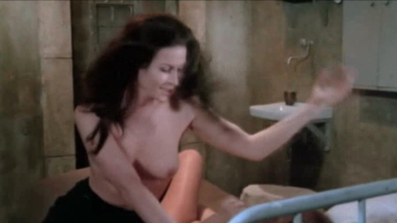 Olga Bisera en un fotograma del film Diario segreto da un carcere femminile, dirigido por Rino Di Silvestro en 1973.